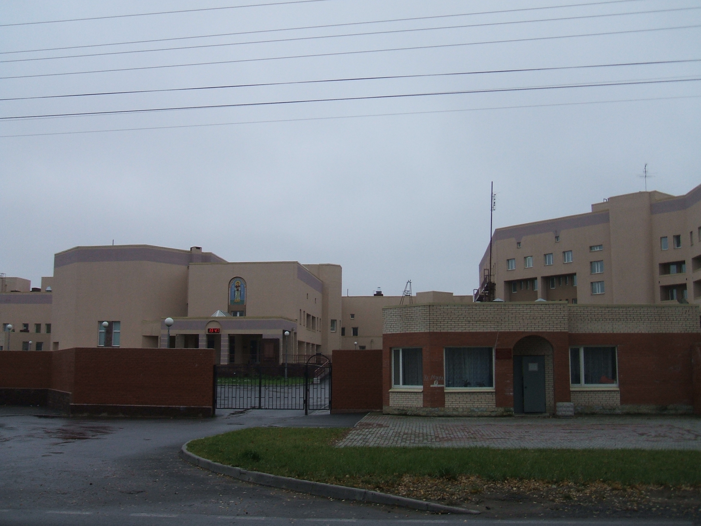 ПНИ №1 в г.Зеленогорске СПб